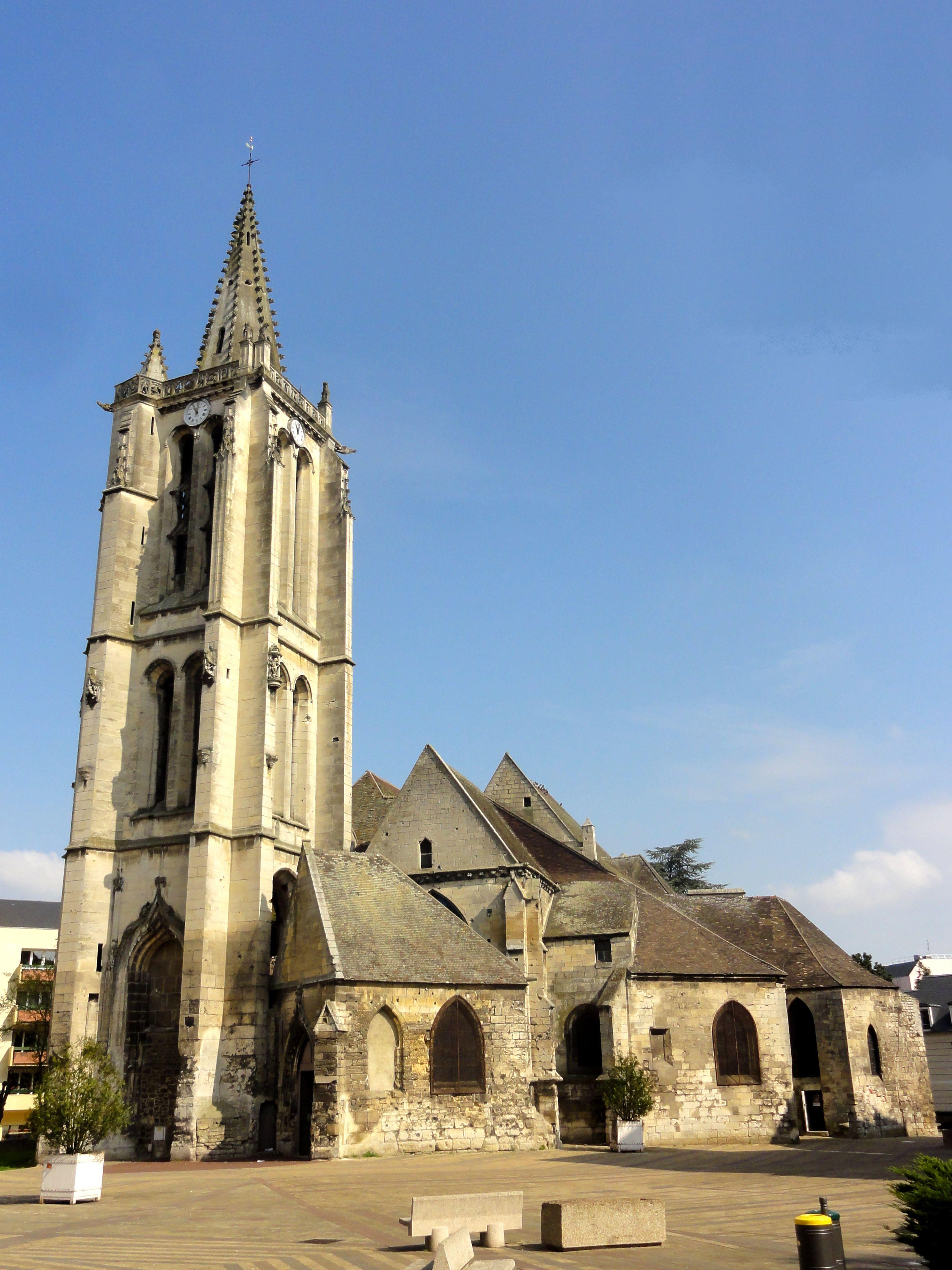 Vue d'ensemble depuis le sud.